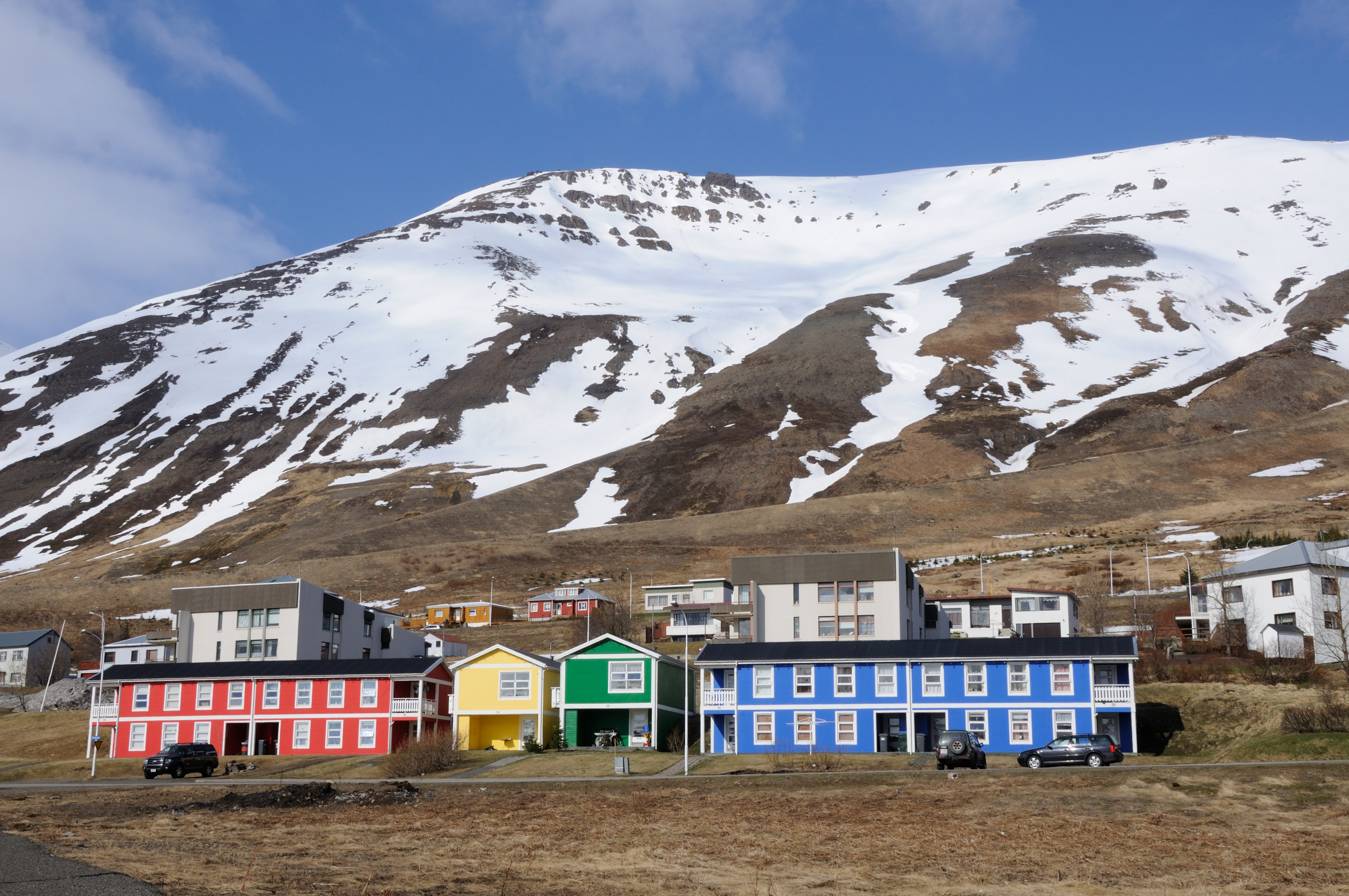 Iceland, Siglufjörður